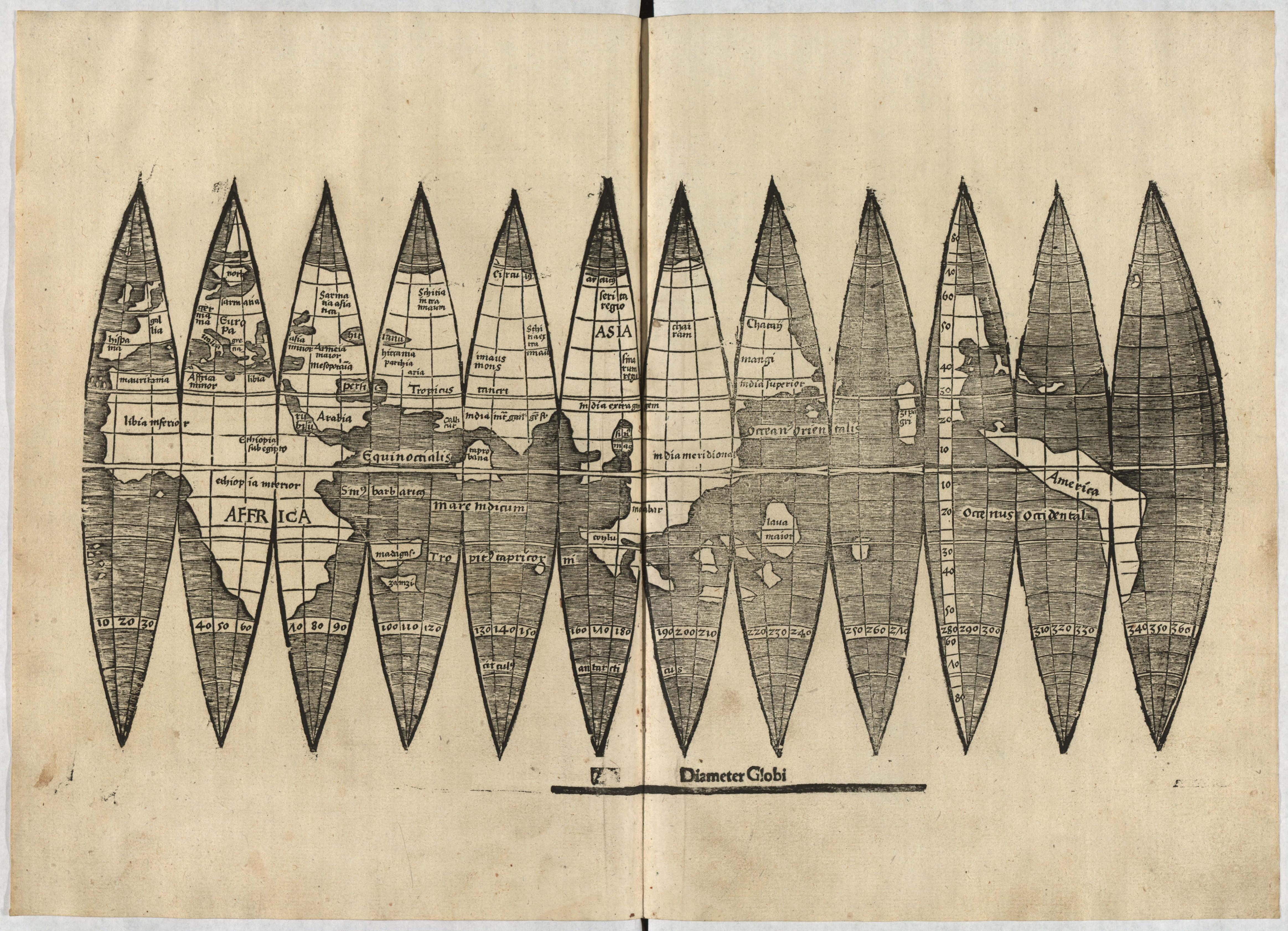 Waldseemüller, Globensegmente, Universitätsbibliothek München, Cim. 107#2 (= 2 Math. 499#2)